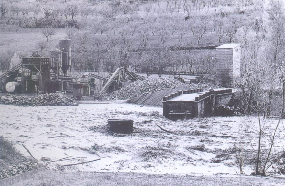 Aiguats del 1982, palanca d'Alàs, Alt Urgell.